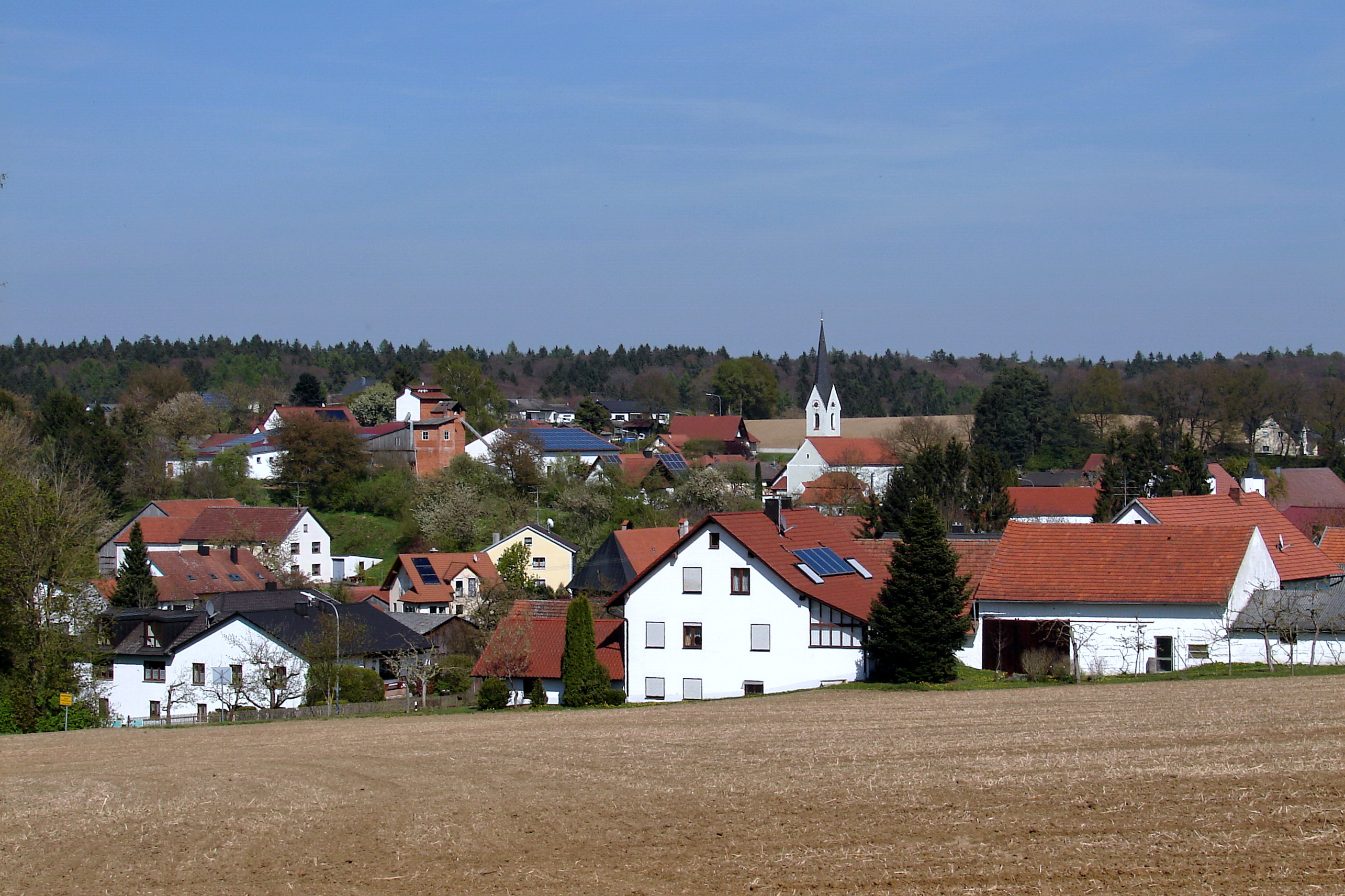 Niederhornbach ist ein Ortsteil der Marktgemeinde Pfeffenhausen im niederbayerischen Landkreis Landshut. Bis 1978 bildete es eine selbstständige Gemeinde.